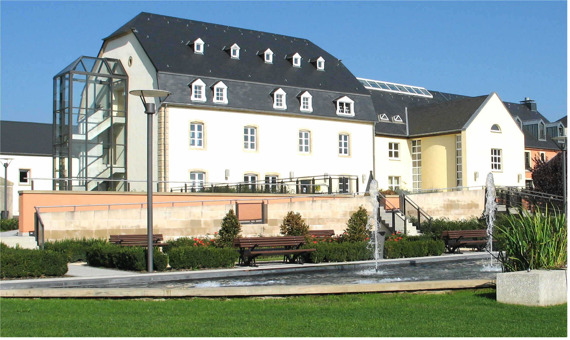 De Centre Barblé zu Stroossen. Kategorie:Gemeng Stroossen